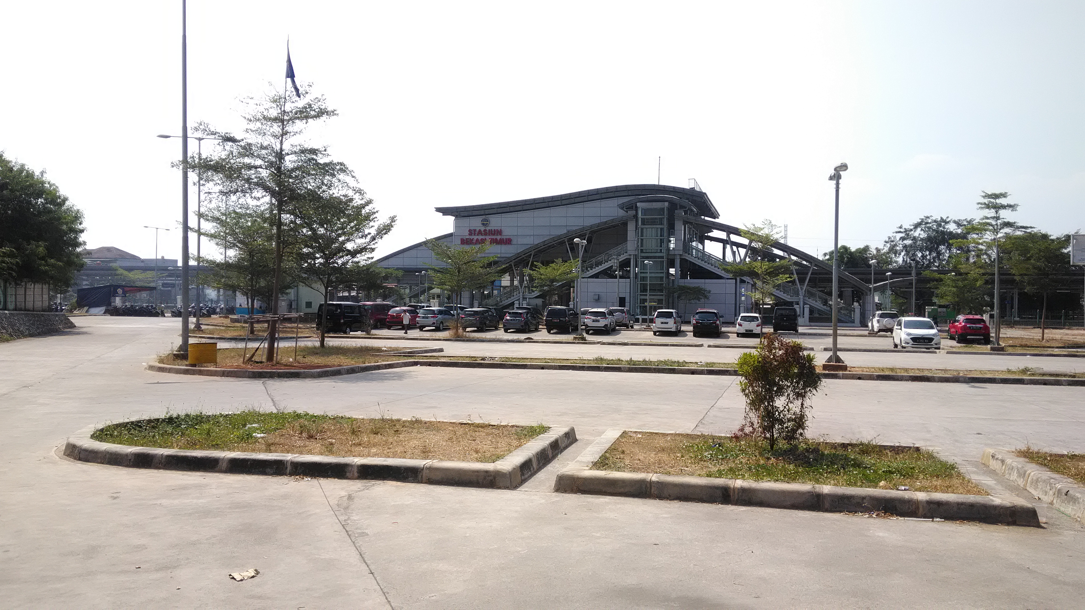 Stasiun Bekasi Timur, 2019